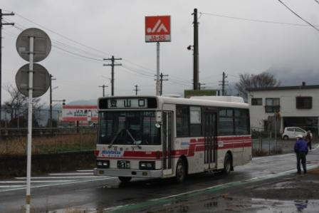 日田バス208